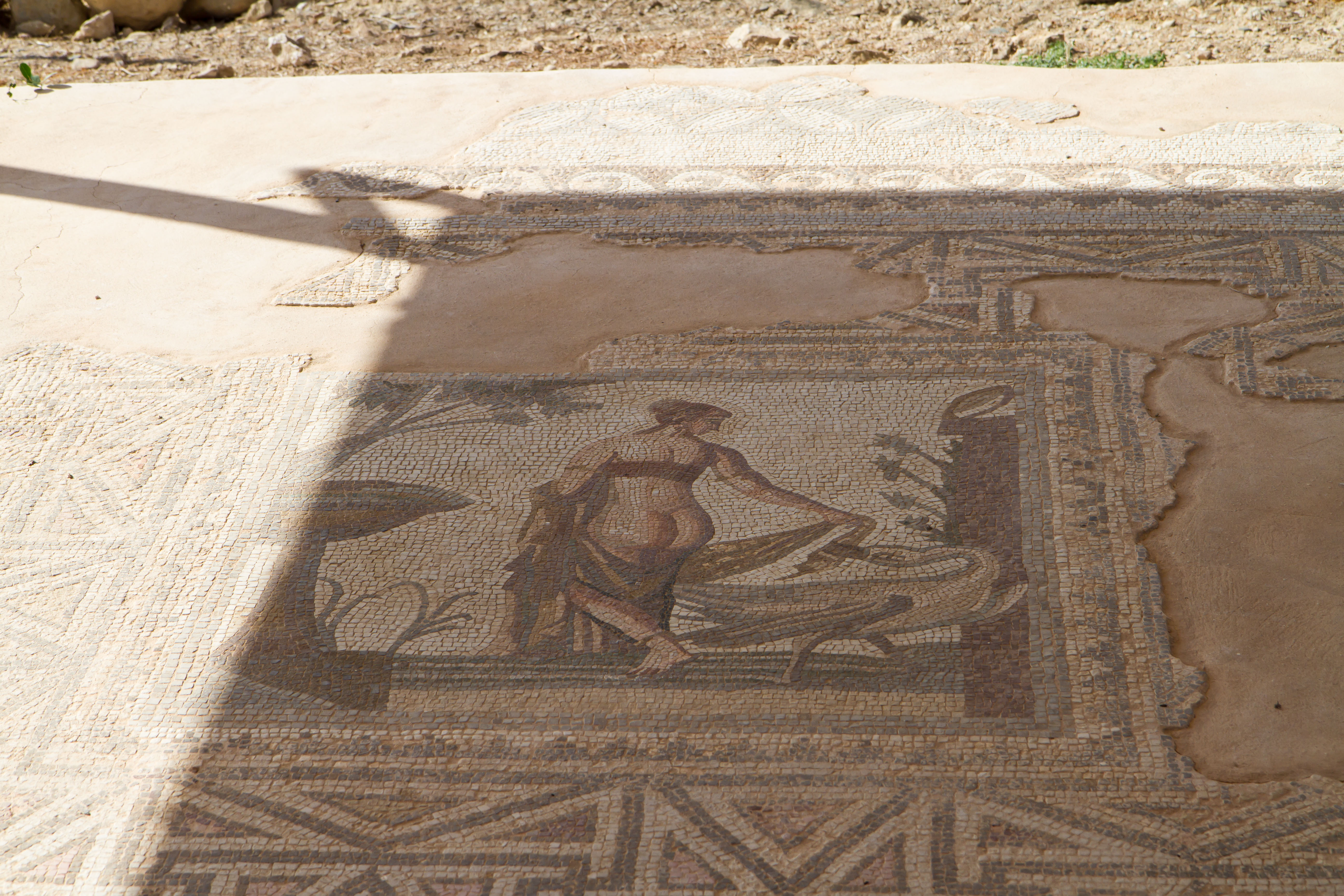 Kouklia, Cyprus